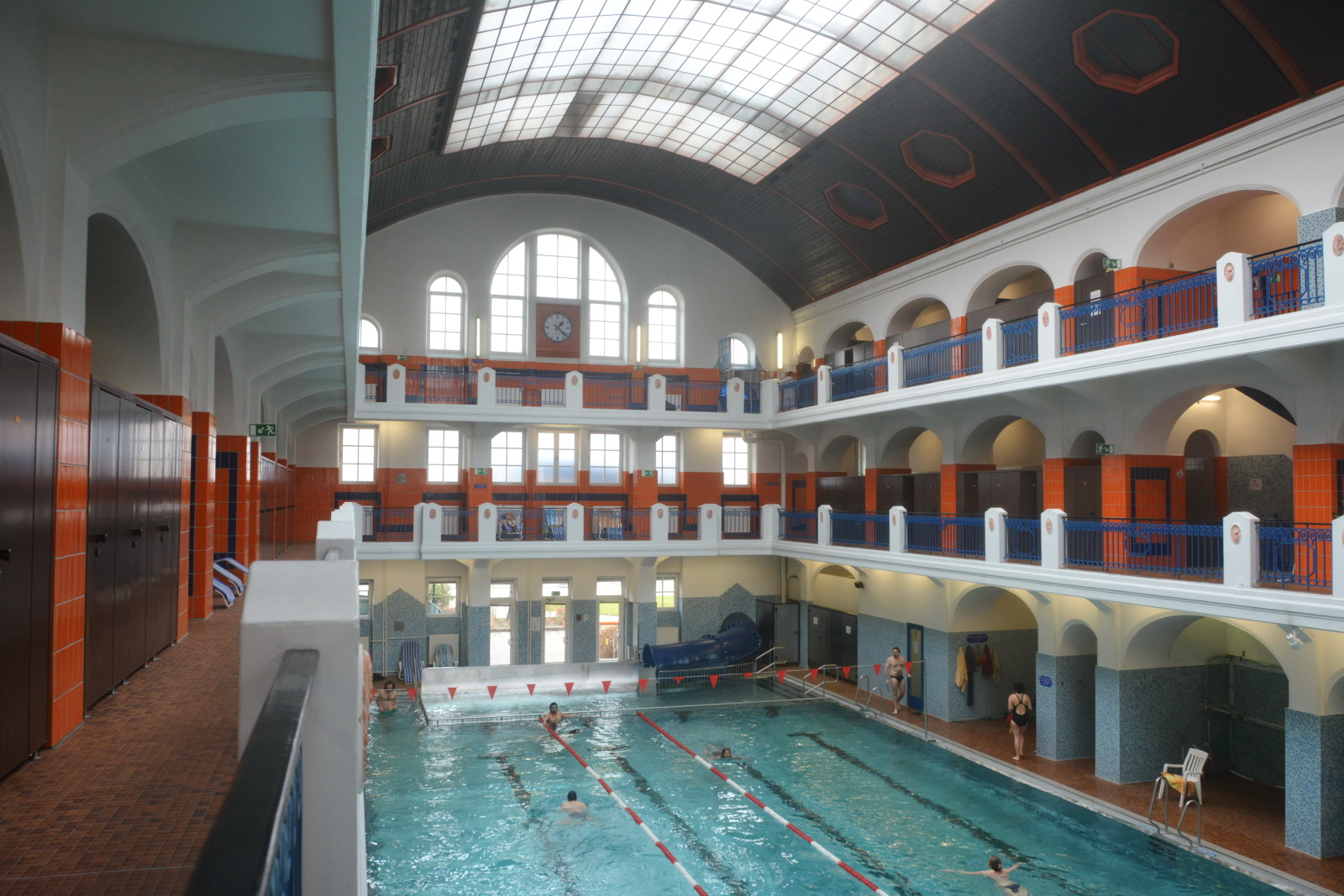 DEHIO Wien, S445, Schutzzone, BDA Bescheid, erb.1912-1914